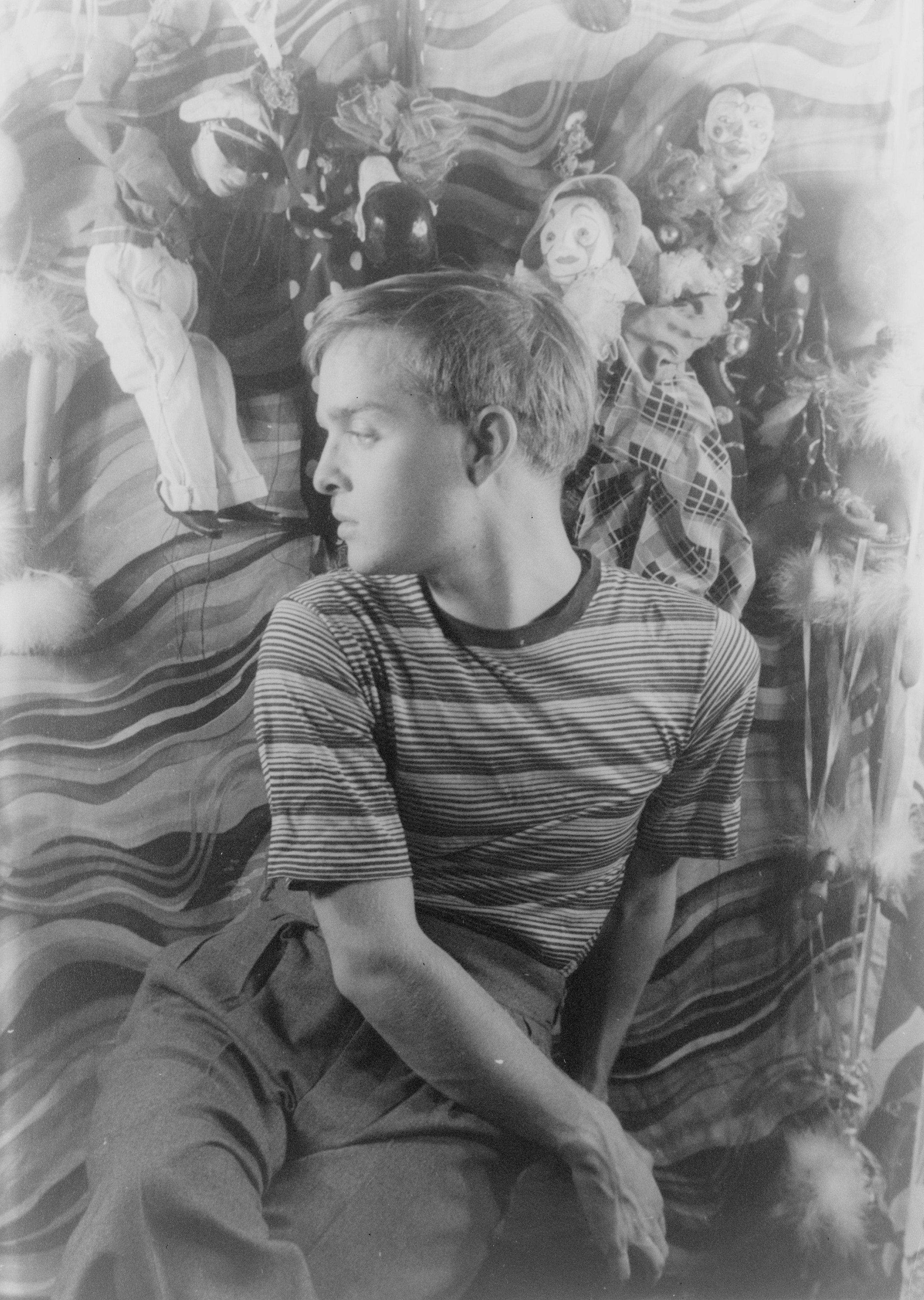 Truman Capote, 1948